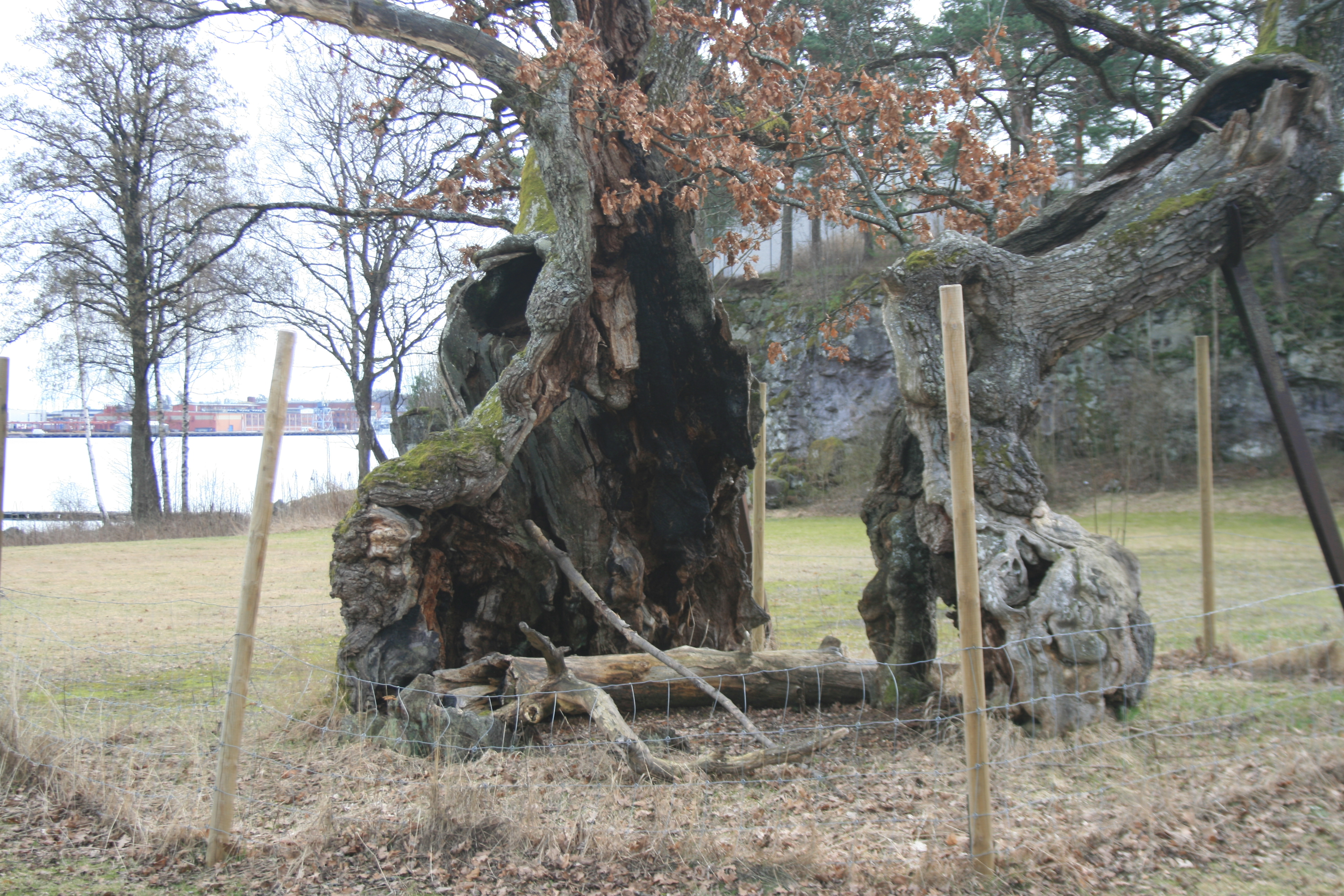 Treet har både støttepilarer og støttevaiere for å holdes i live.